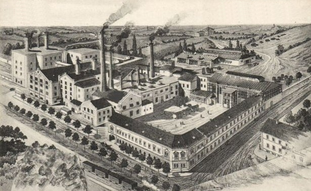 Haggenmacher Henrik sörgyára Budafokon.